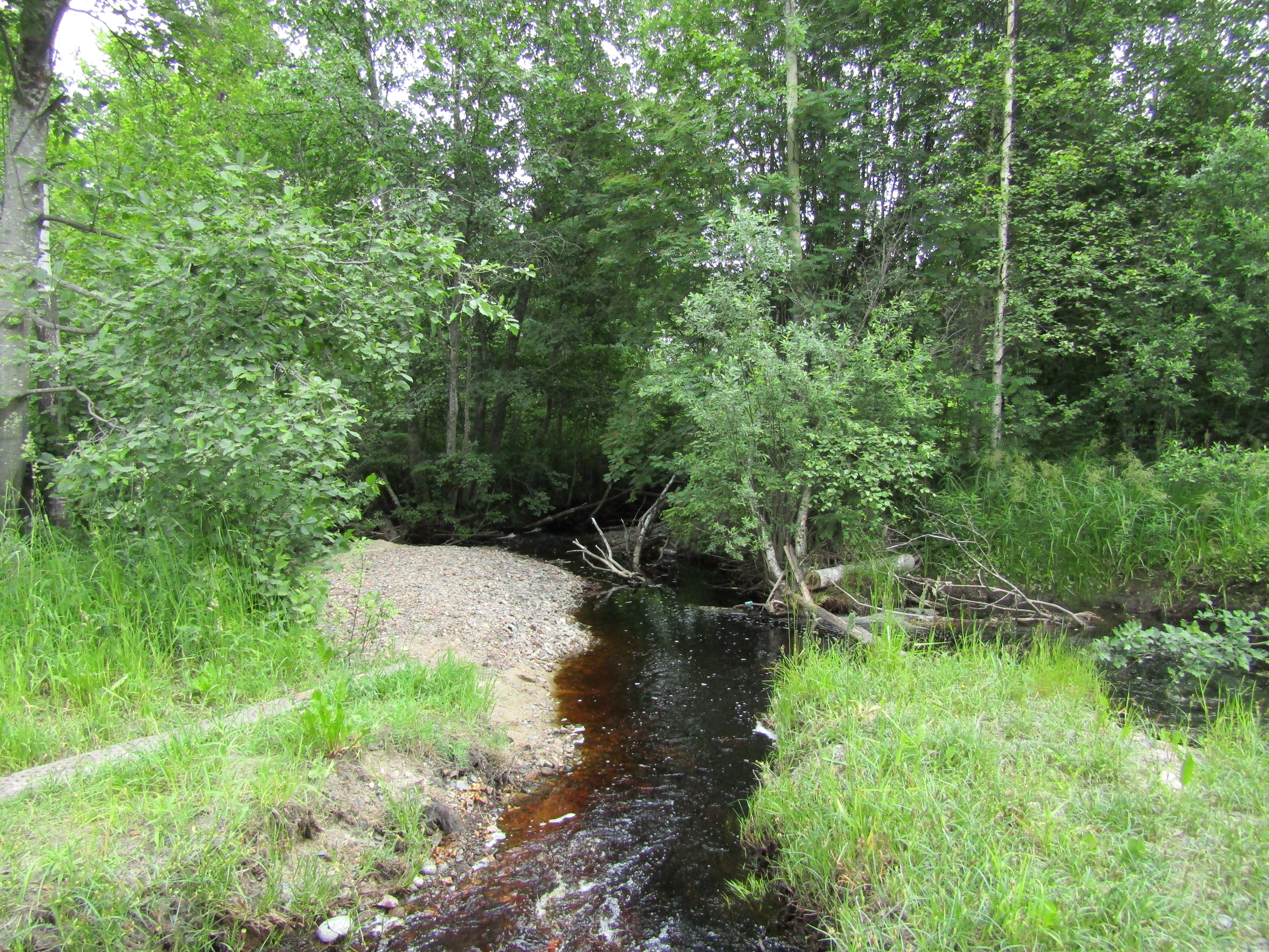 Река Орзега в Прионежском районе Карелии.